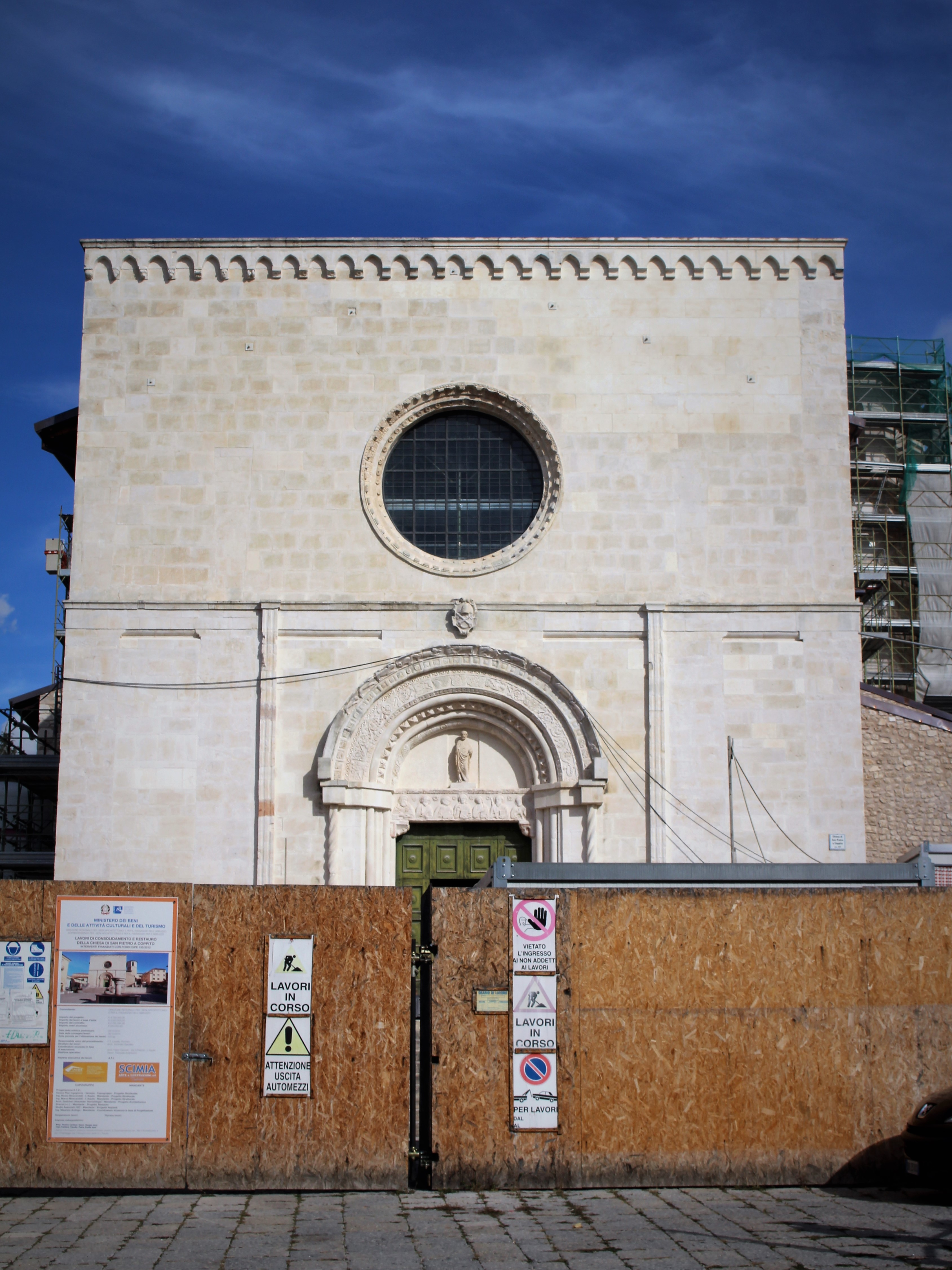 Facciata della chiesa di San Pietro in L'Aquila nel 2017.